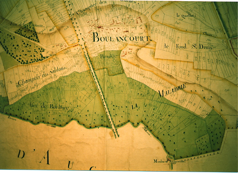 Photo du plan de seigneurie de Boulancort